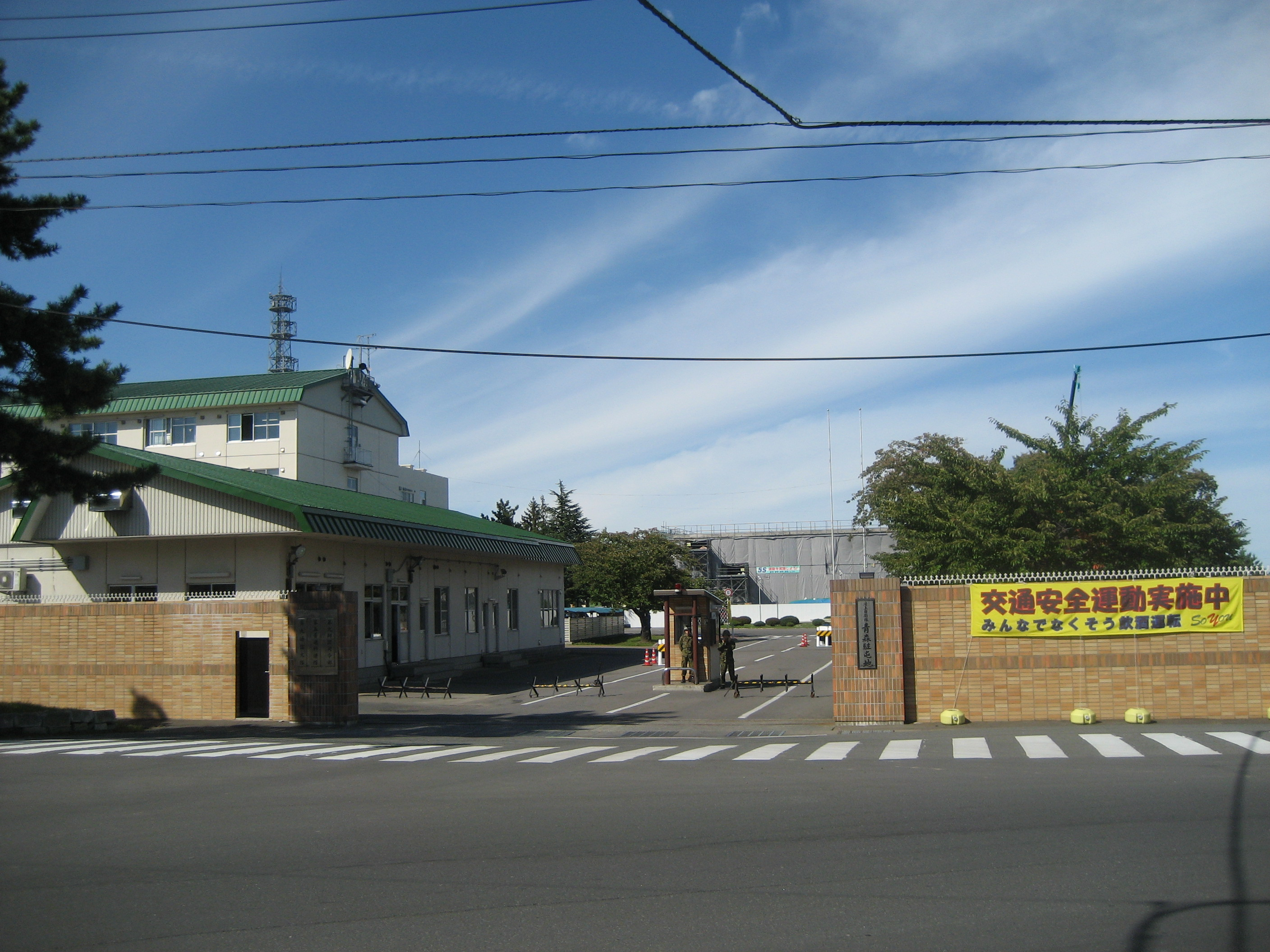 陸上自衛隊青森駐屯地出入口付近を撮影